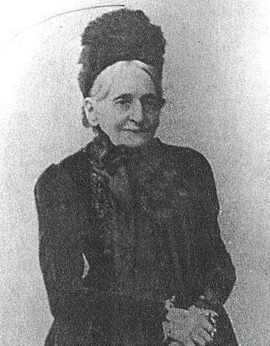 Александра Николаевна Стрекалова, ур. Касаткина-Ростовская (1821—1904)